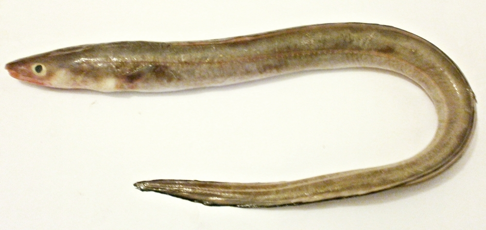 Congrio (Conger conger).